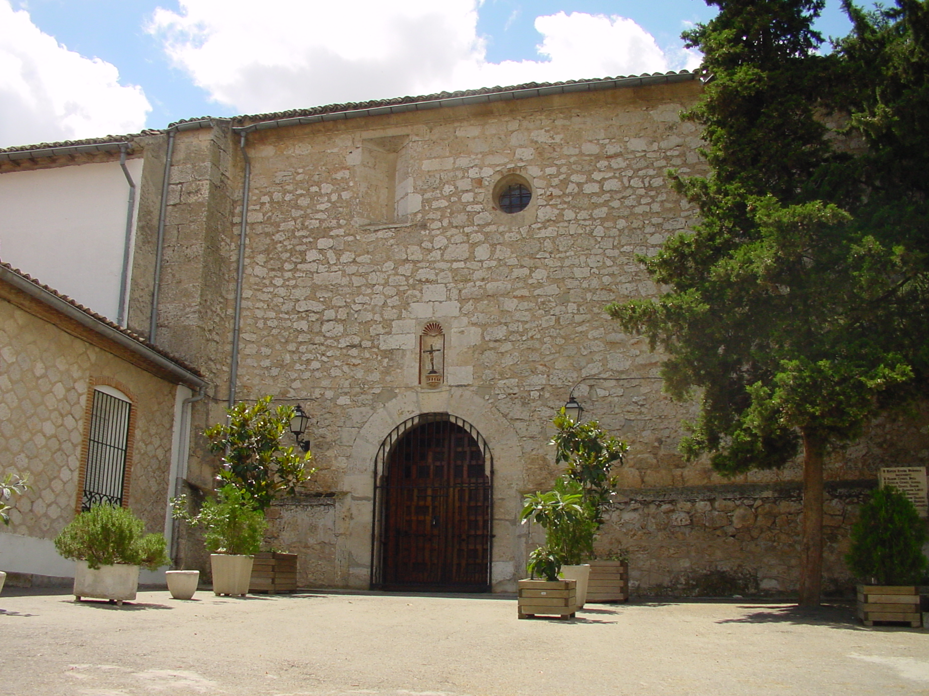 Iglesia en Perales de Tajuña.